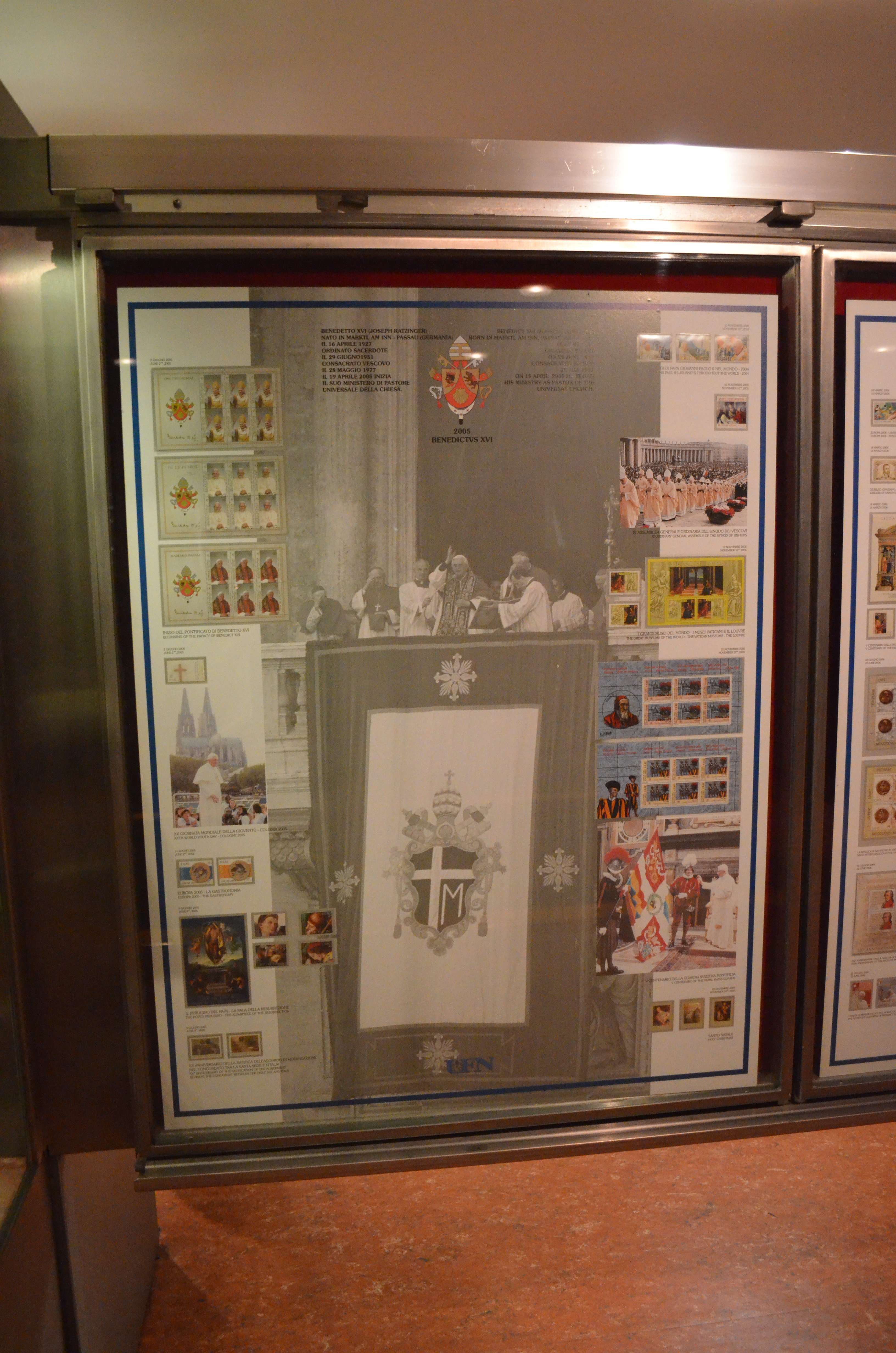 Vatican Museums